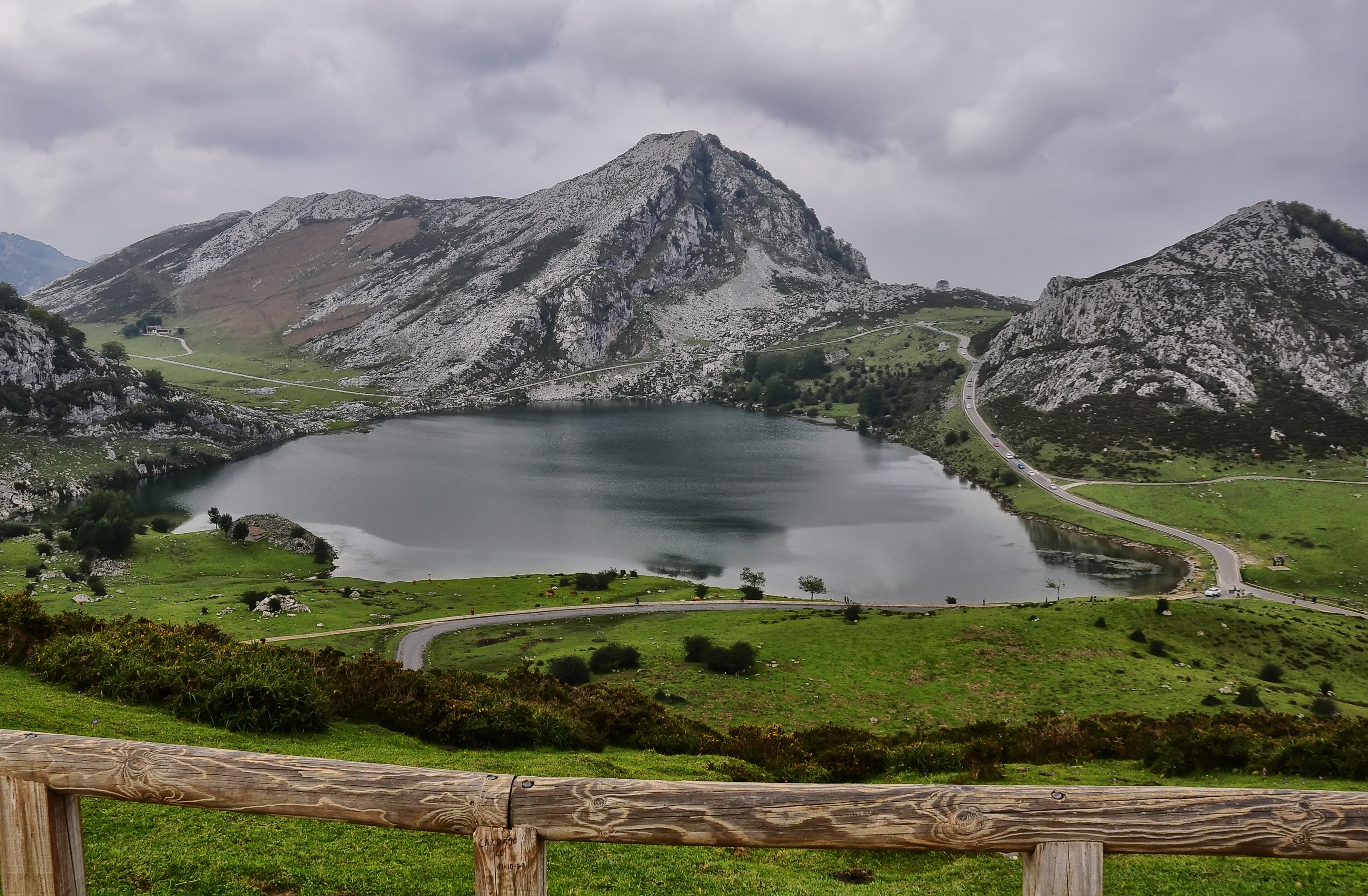 Picos de Europa (Asturias) This is a photography of a Special Area of Conservation in Spain with the ID: ES1200001. Natura2000 entry, EEA entry